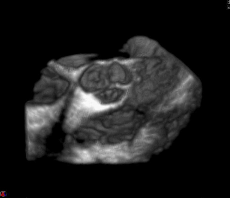 tricuspid aortic valve in 3D ultrasound (TEE)